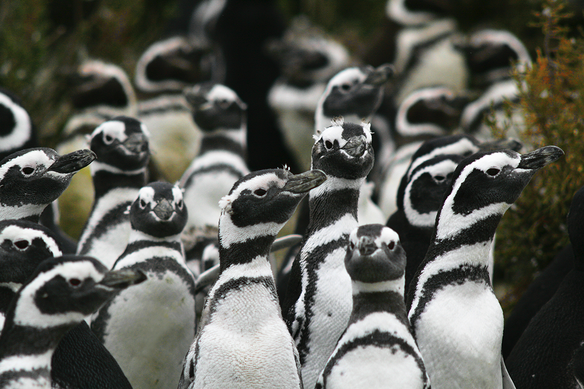 Colonia de pingüinos magallánicos en Cabo Vírgenes.